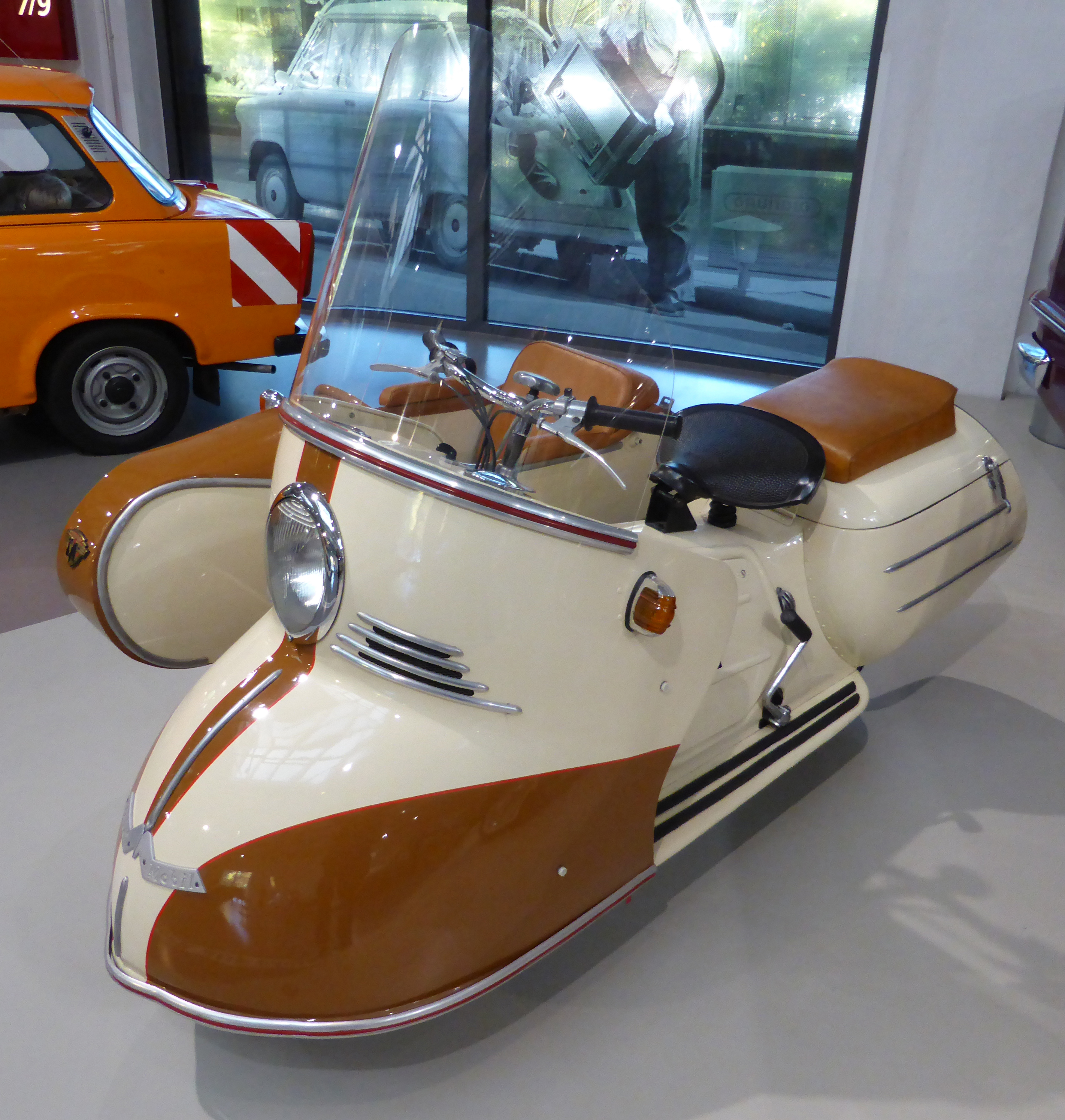 Maico-Mobil MB 175, Baujahr 1953. Ausgestellt im Deutschen Technikmuseum in Berlin. Wikipedianische KulTour am 10. Oktober 2015 in der Ausstellung des Museums.